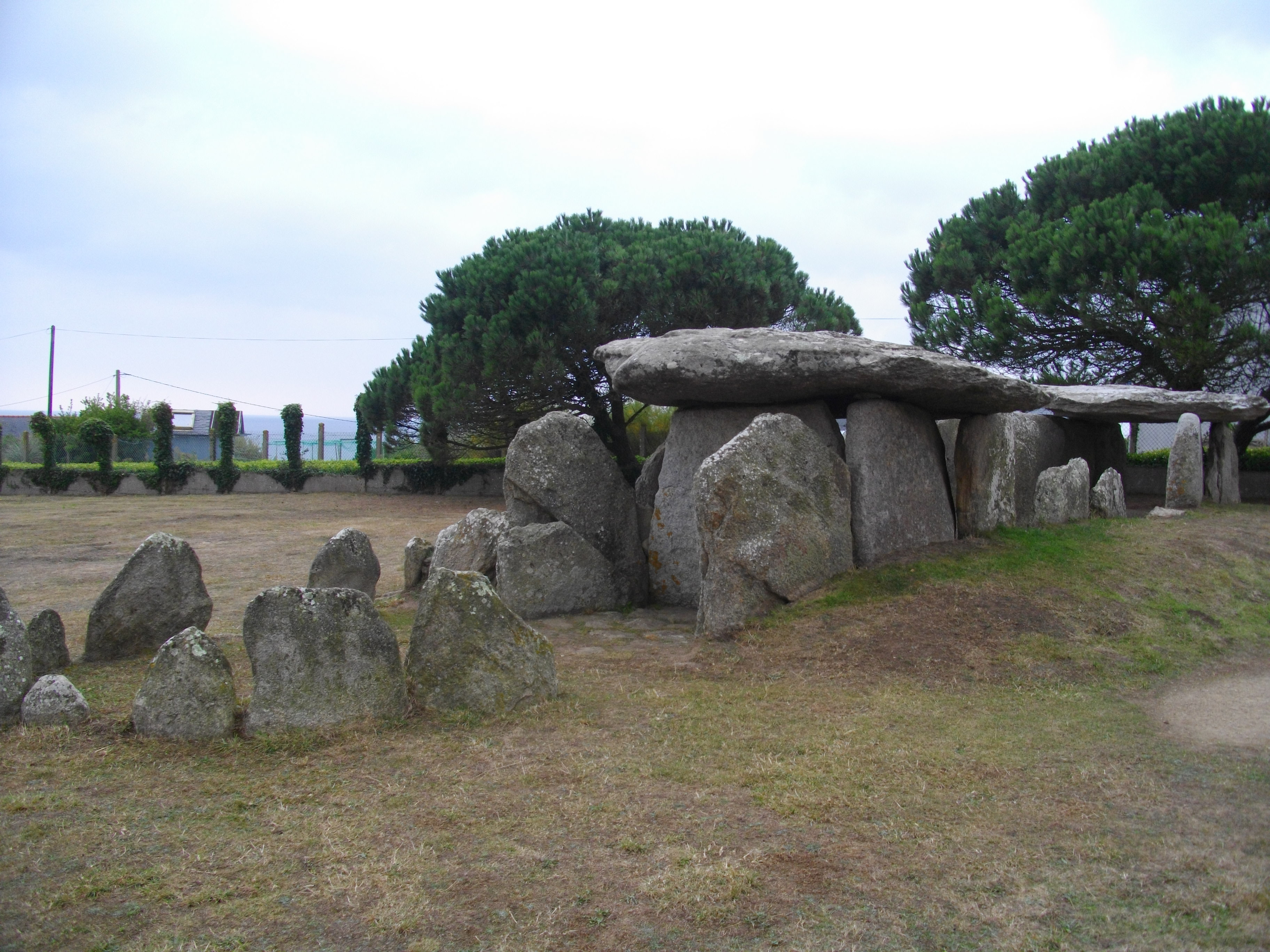 Allée couverte Menez Korriged de Pors Poulhan à Plouhinec, chez Plozévet